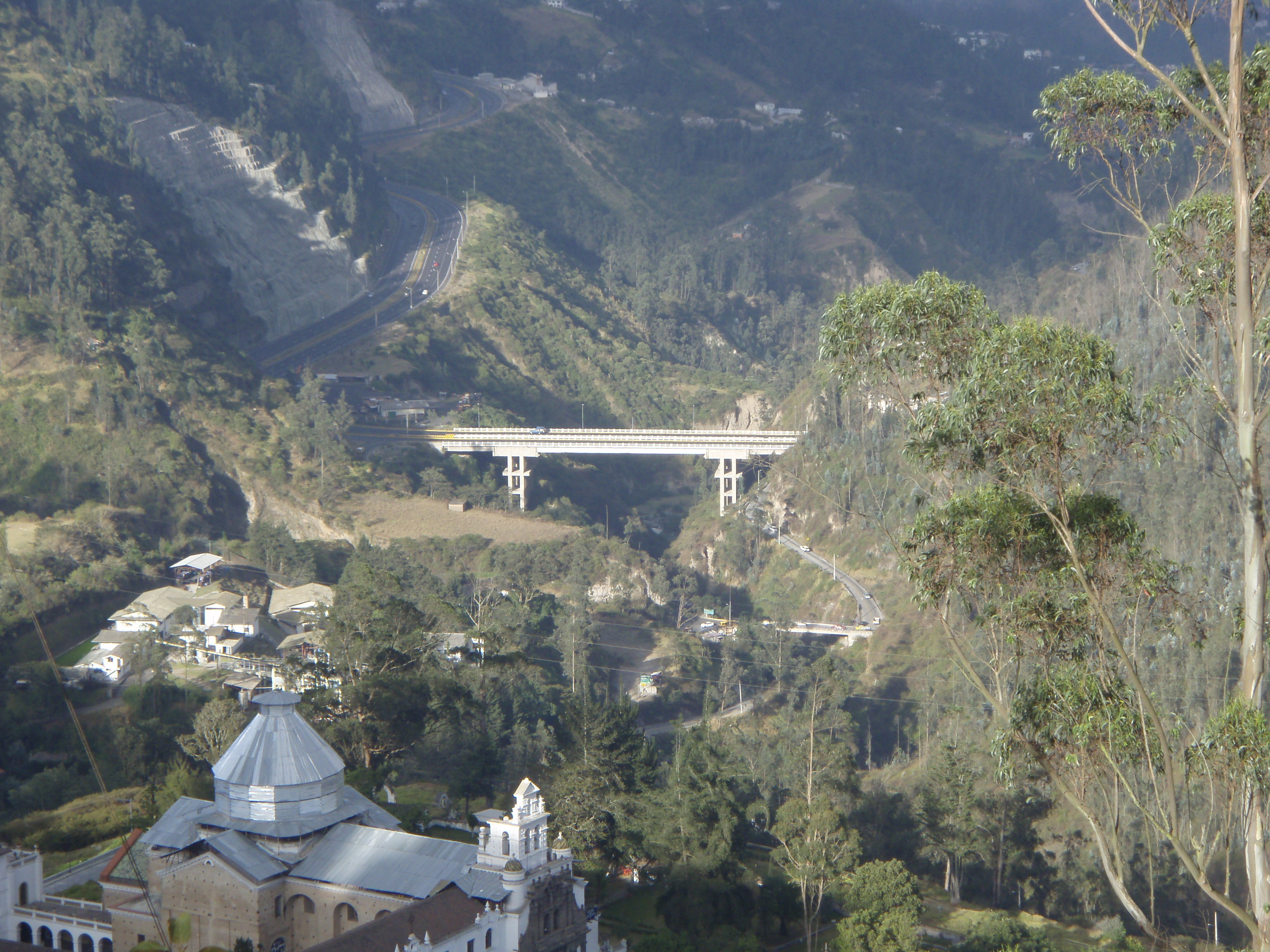 Iglesia de Guápulo y puente